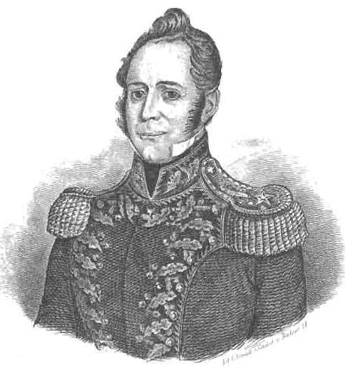 José María Benavente y Bustamante (* Concepción, 10 de septiembre de 1785 - † La Serena, 1833), militar chileno, fue Ministro de Guerra y Marina durante el año 1830.